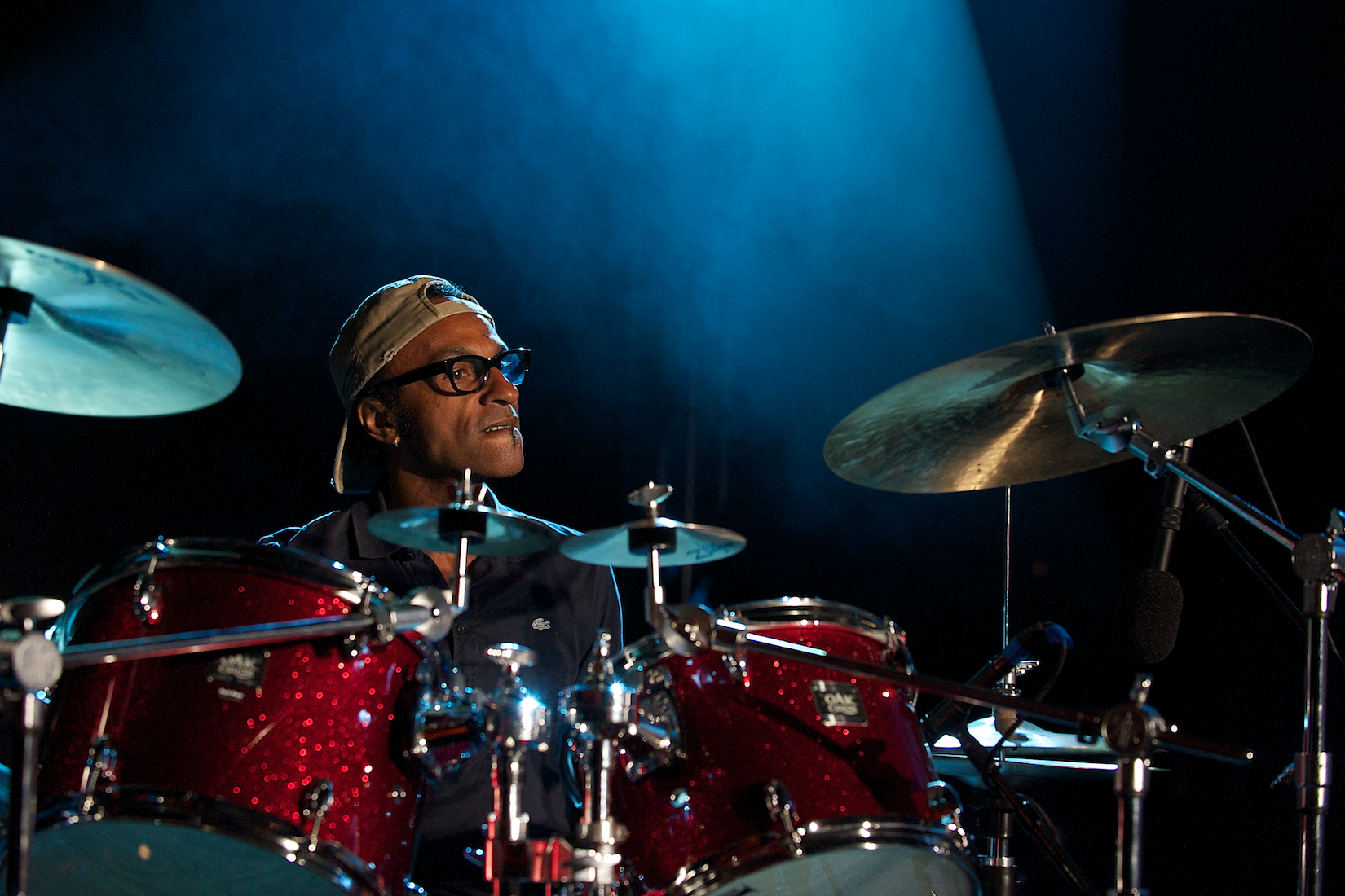 Manu Katché beim Würzburger Hafensommer am 10.08.2010